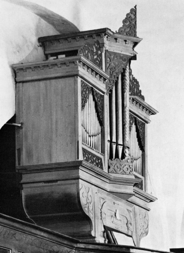 Foto der Orgel von Georg Henrich Wagner (1663) in der Evangelischen Kirche Bad Laasphe, Kreis Siegen-Wittgenstein, Nordrhein-Westfalen, Deutschland